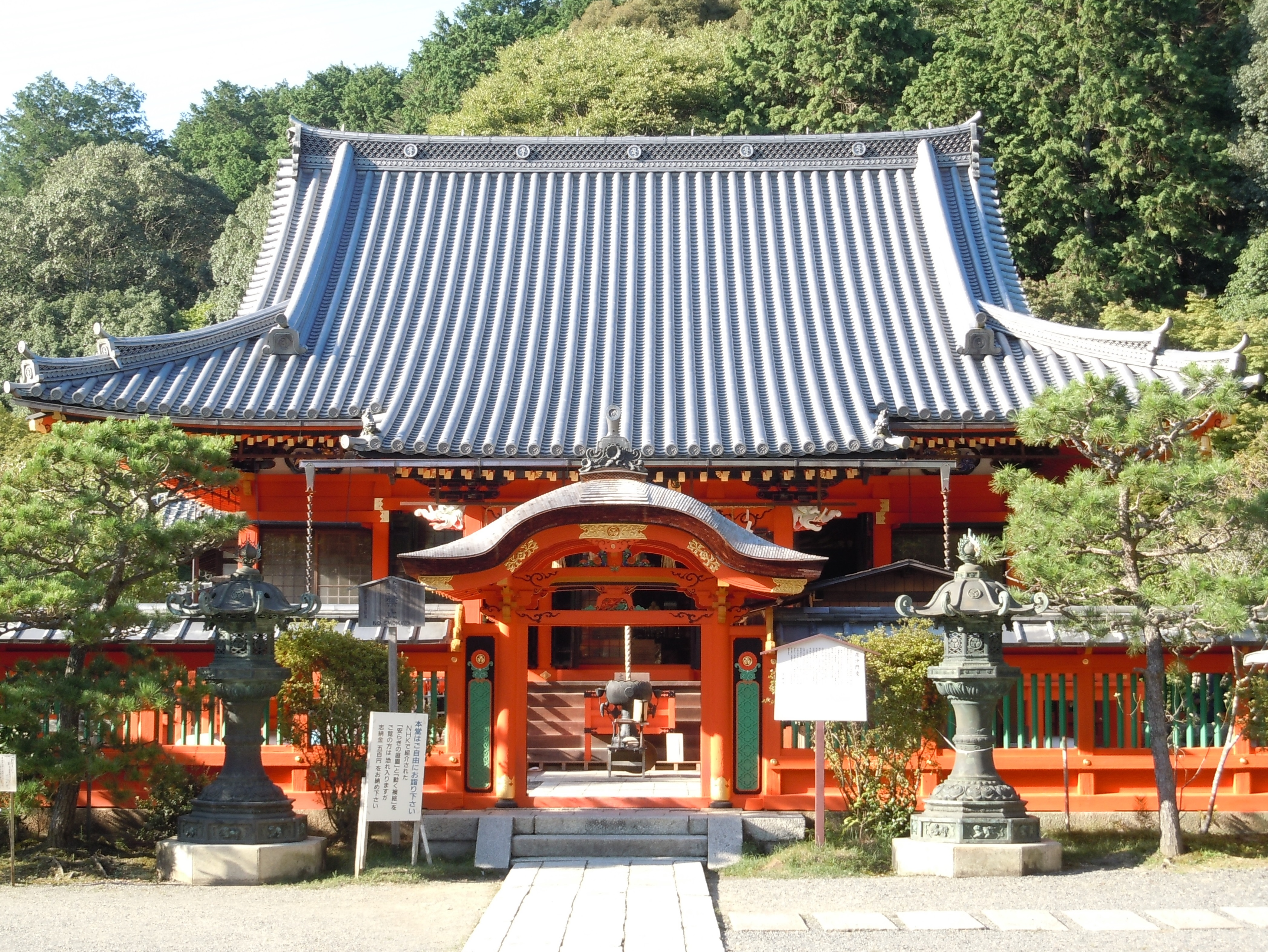 修復工事終了後の毘沙門堂本堂。